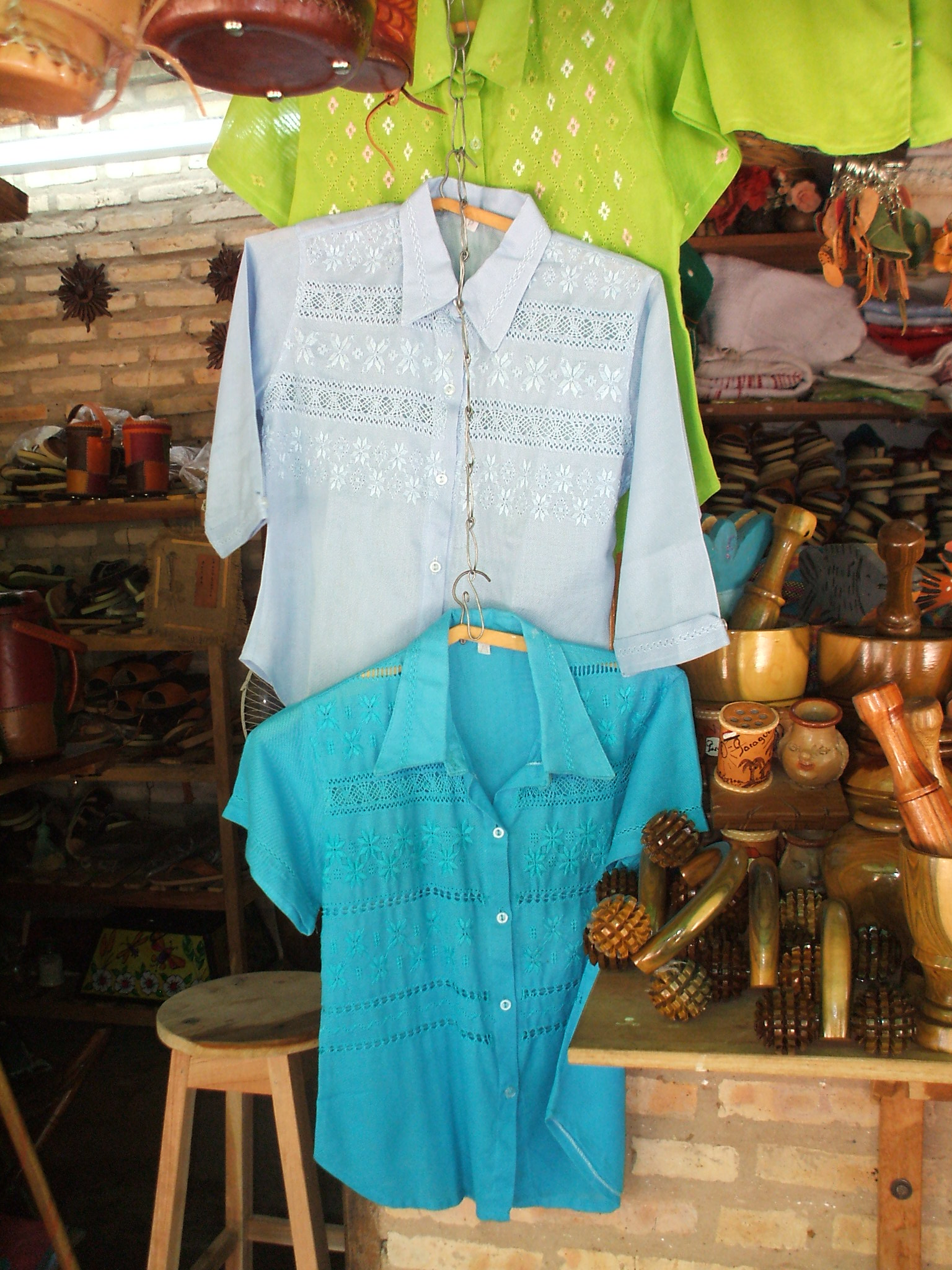 Ao po´i